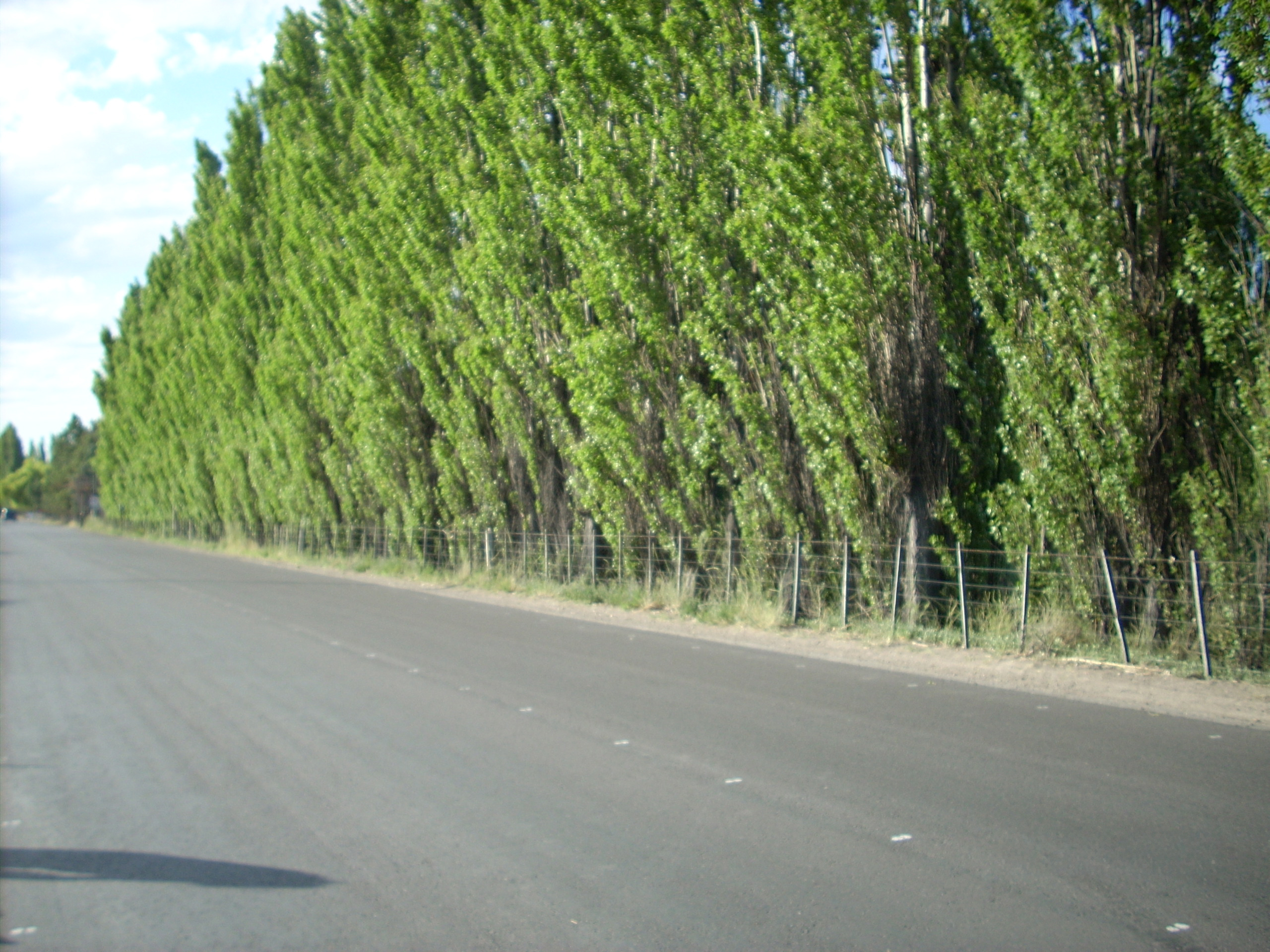 Barrera rompevientos y ruta prov. 7